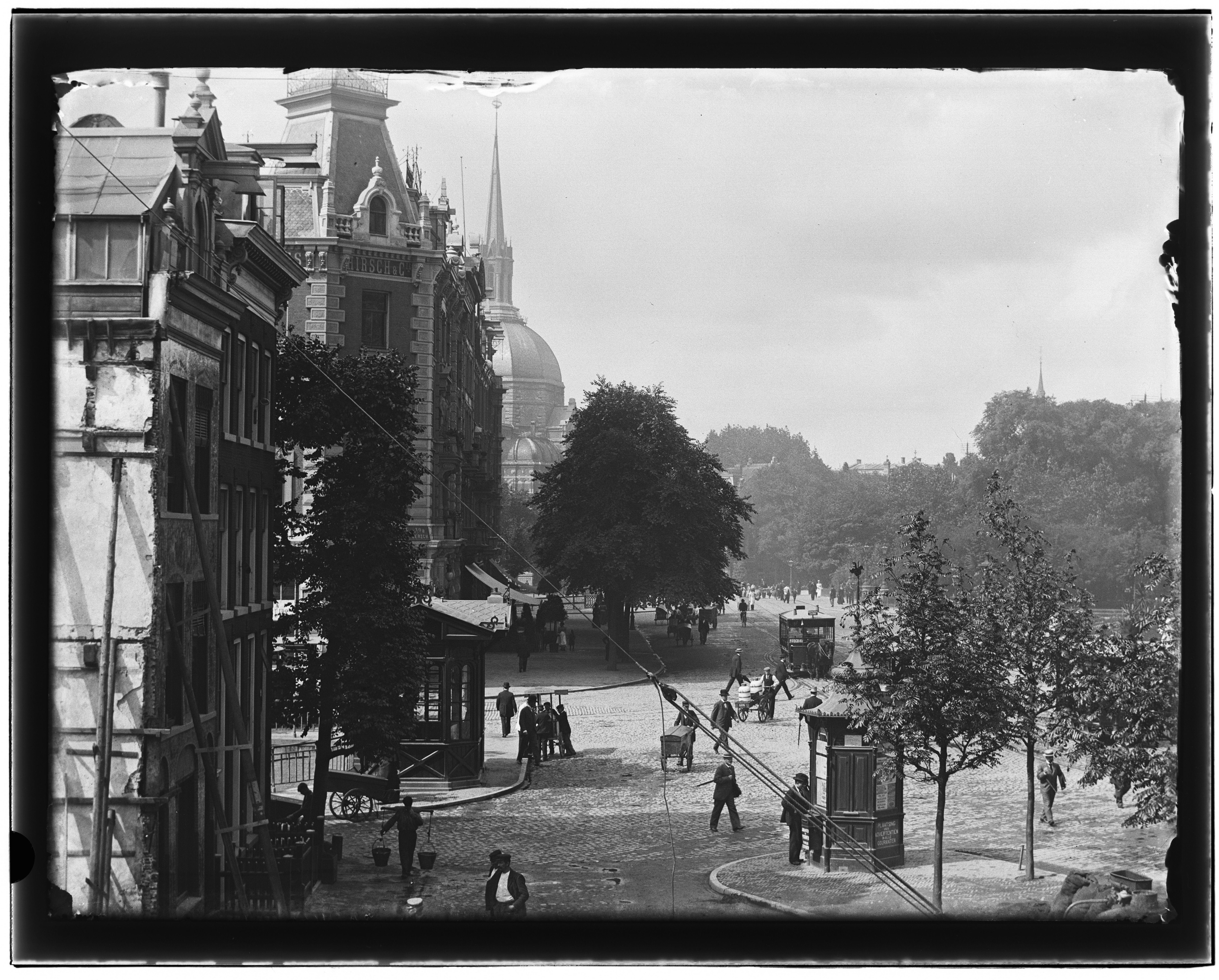 Beschrijving Leidseplein 19 t/m 27 (v.l.n.r.) Tijdens de bouw van het Politiebureau``, Leidseplein 15-17 (uiterst links). Gezien naar Koepelkerk / Stadhouderskade / Leidsebosje. Links is ingang Lijnbaansgracht (na 1915 Kleine Gartmanplantsoen), in het midden het oude Hirschgebouw (zie opschrift). Documenttype foto Vervaardiger Olie``, Jacob (1834-1905) Collectie Collectie Jacob Olie Jbz. Datering 10 juli 1899 Geografische naam Leidseplein Inventarissen Afbeeldingsbestand 10019A000750 Generated with Dememorixer